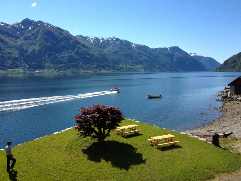 Rasteplass i Nå. Sørfjorden går videre innover mot sør til Odda.